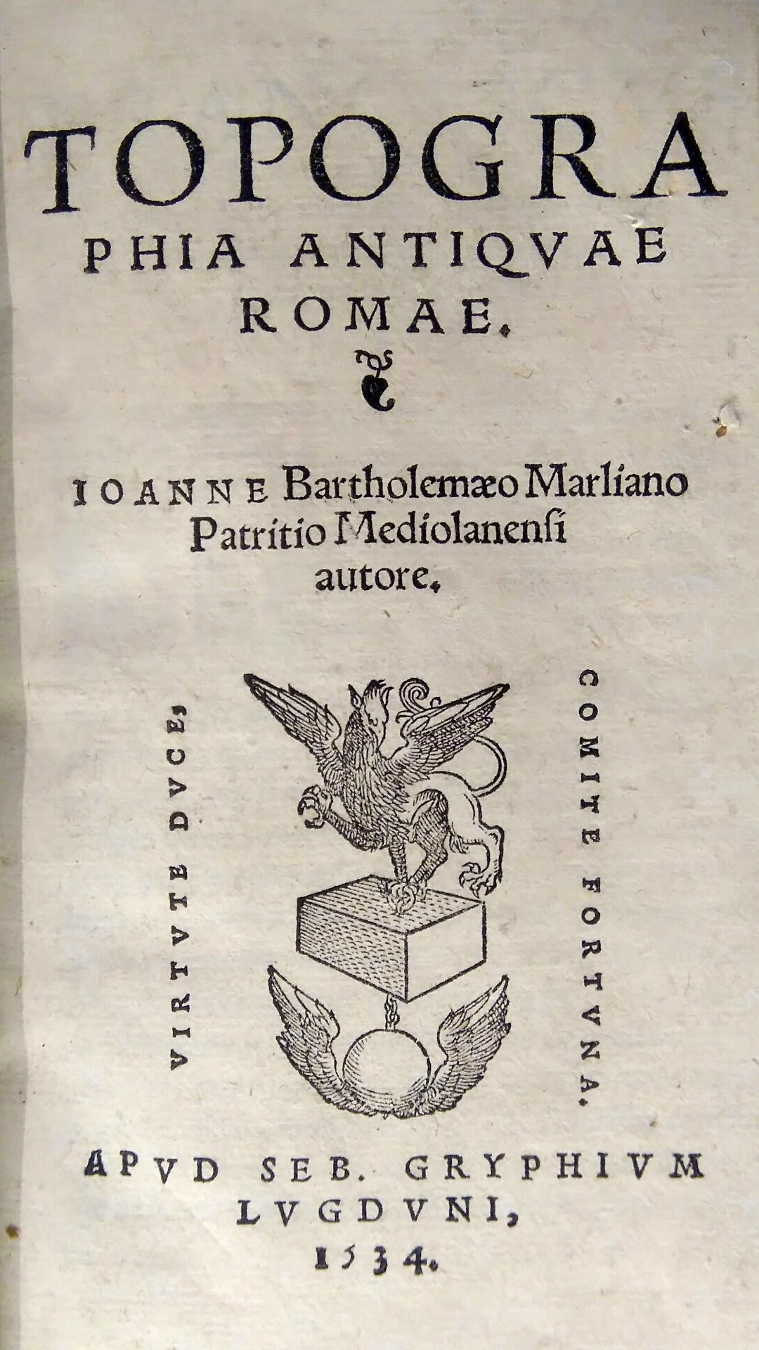 Ouvrage édité et introduit par François Rabelais (vers 1540)